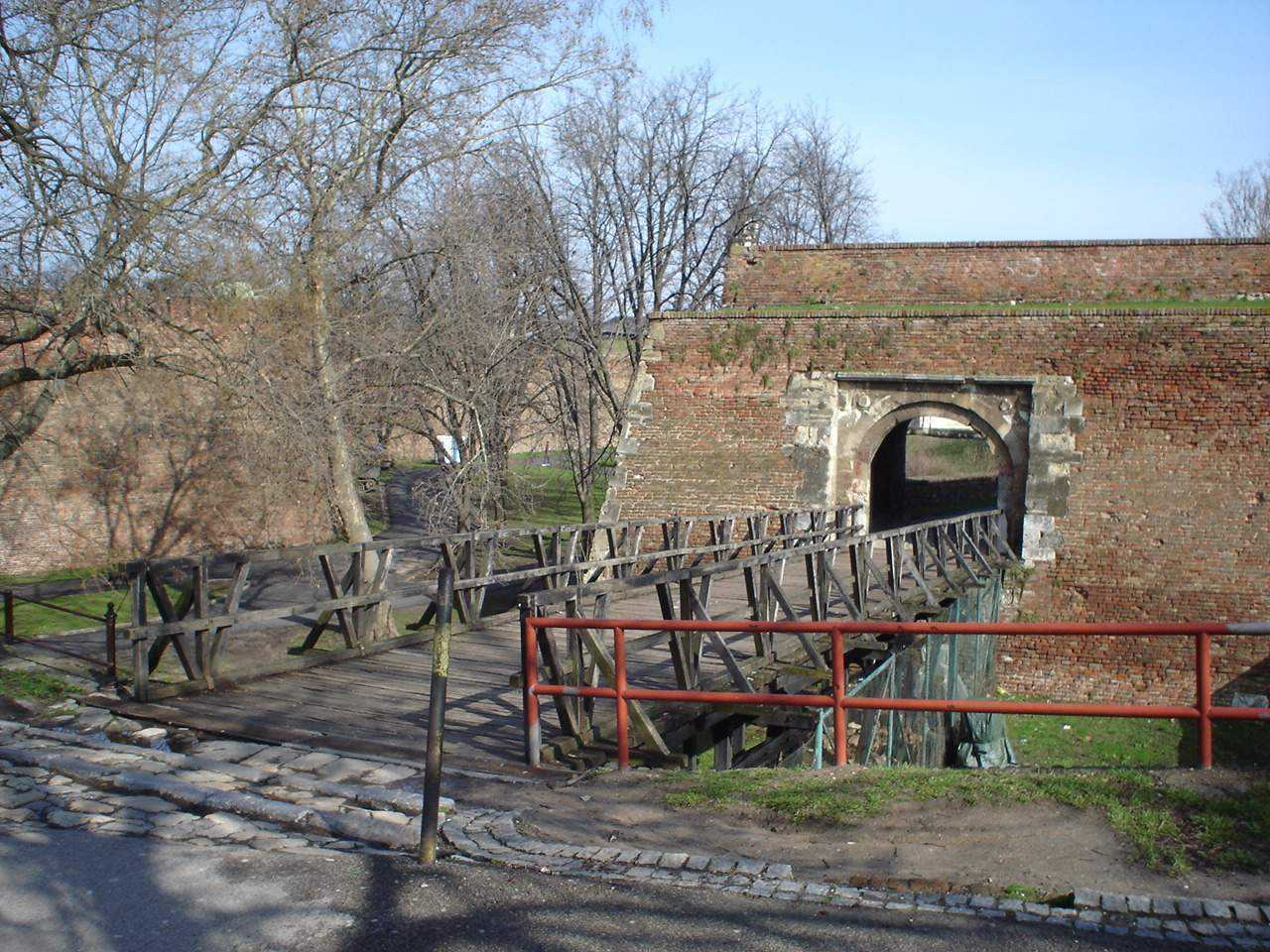 Gate of Karadjordje,Belgrade fortress.